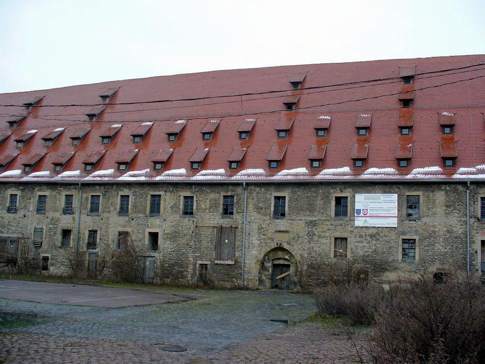 Kornhofspeicher - Große Ackerhofsgasse 13/Moritzstraße 12a, Erfurt, Thüringen, Deutschland